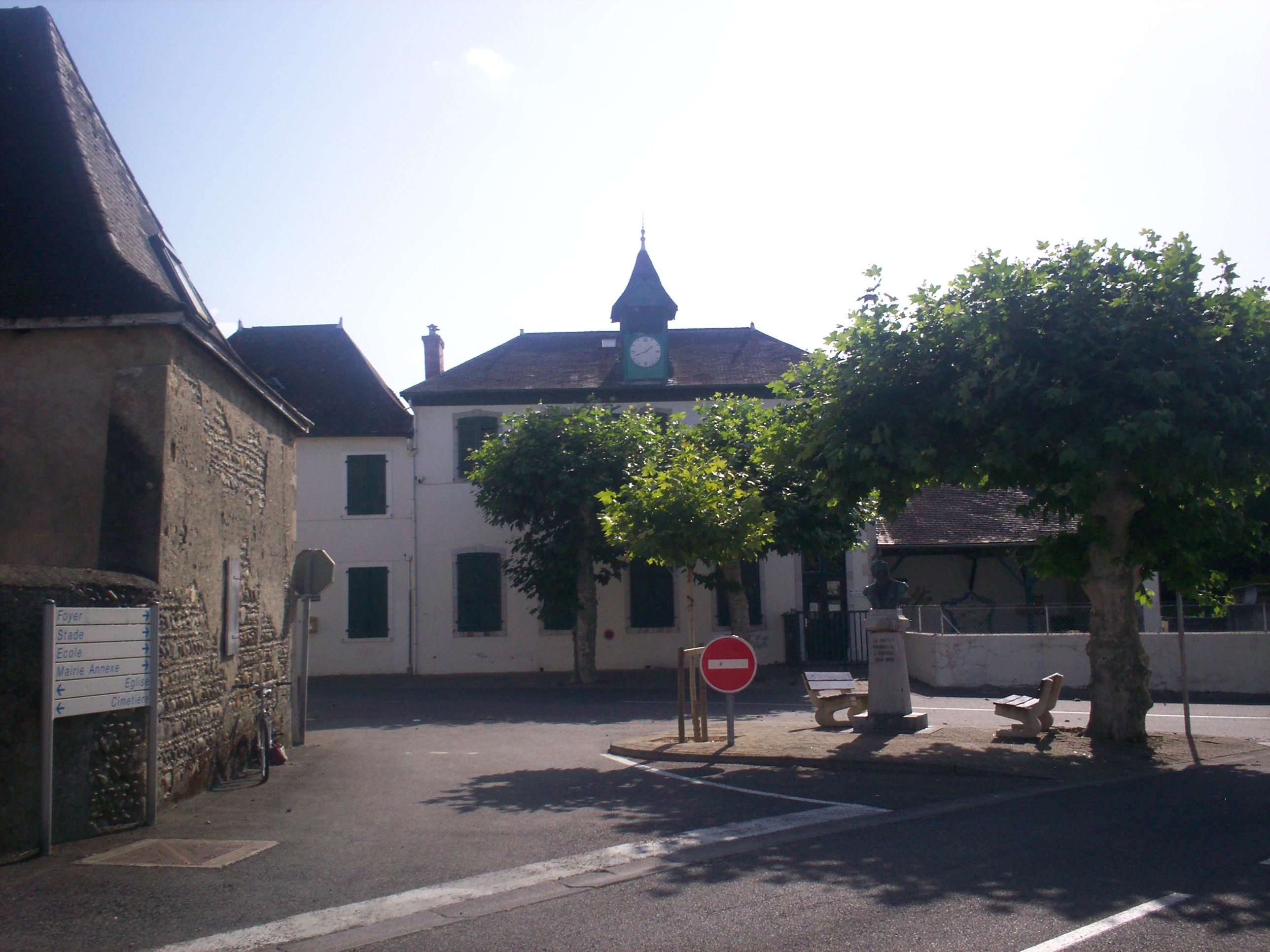 Fotografia personala